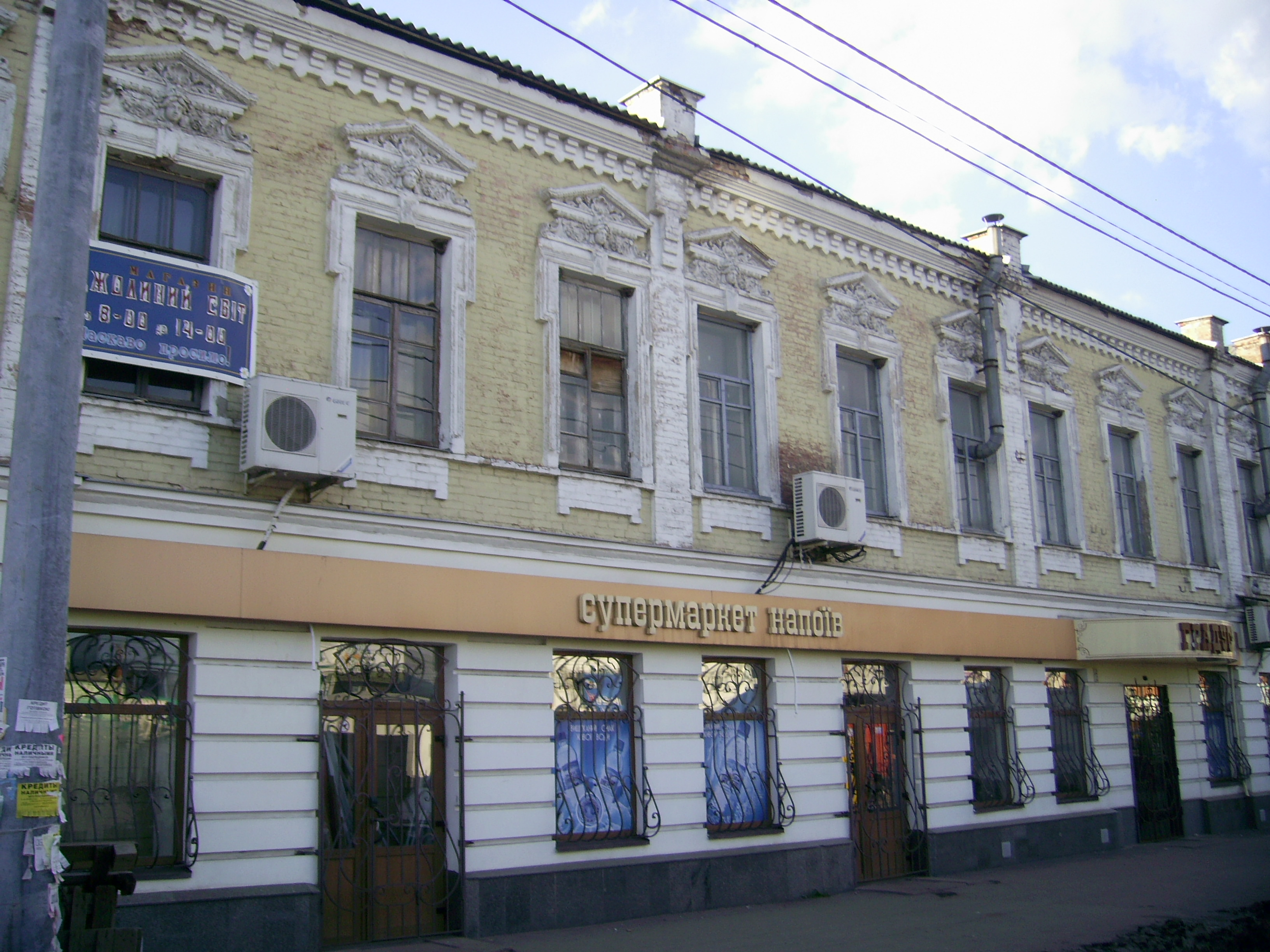 Торговий будинок (Житловий будинок, магазин, приватні магазини). Полтава, вул Новий базар ,4